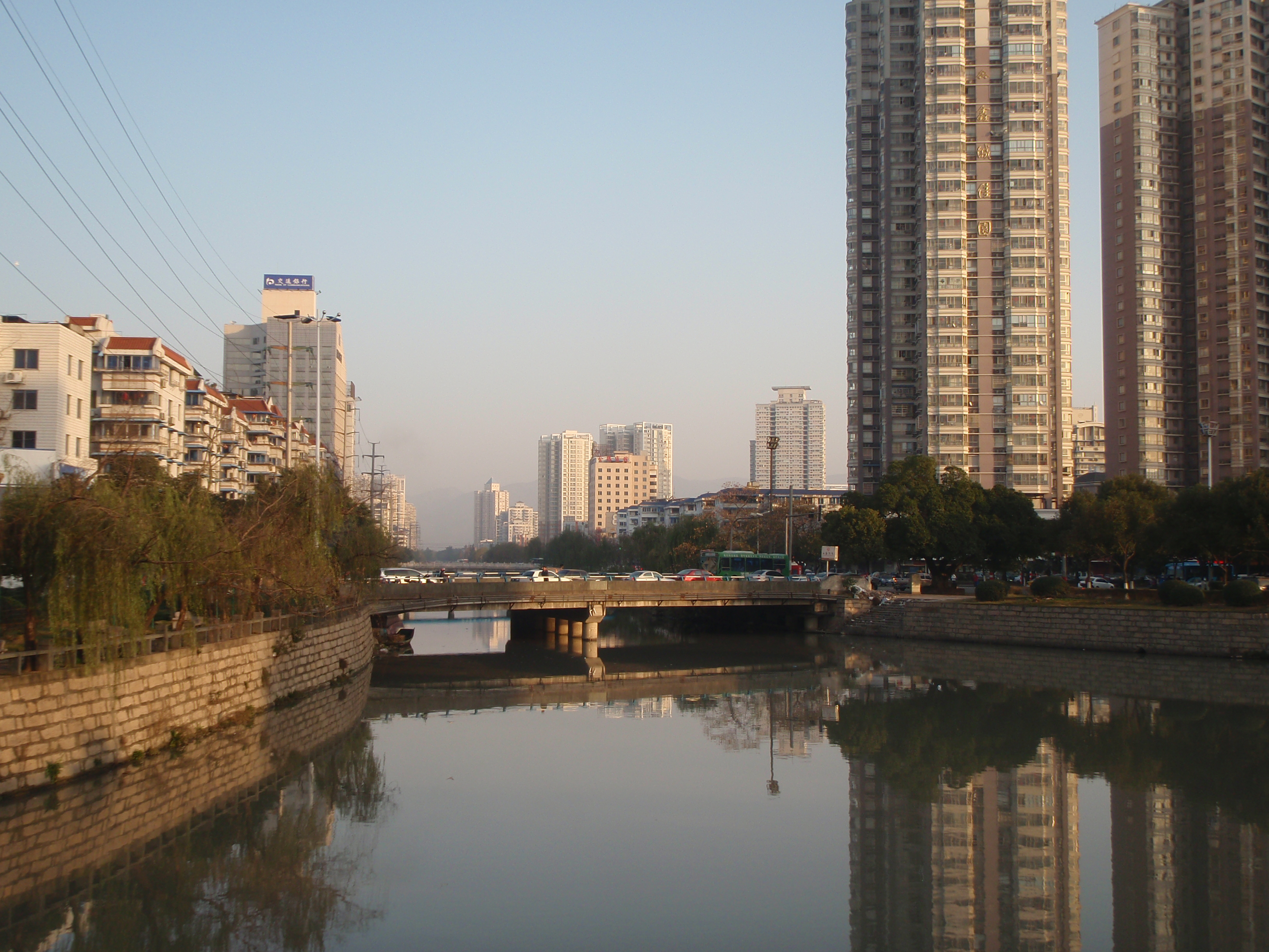 勤奋河边